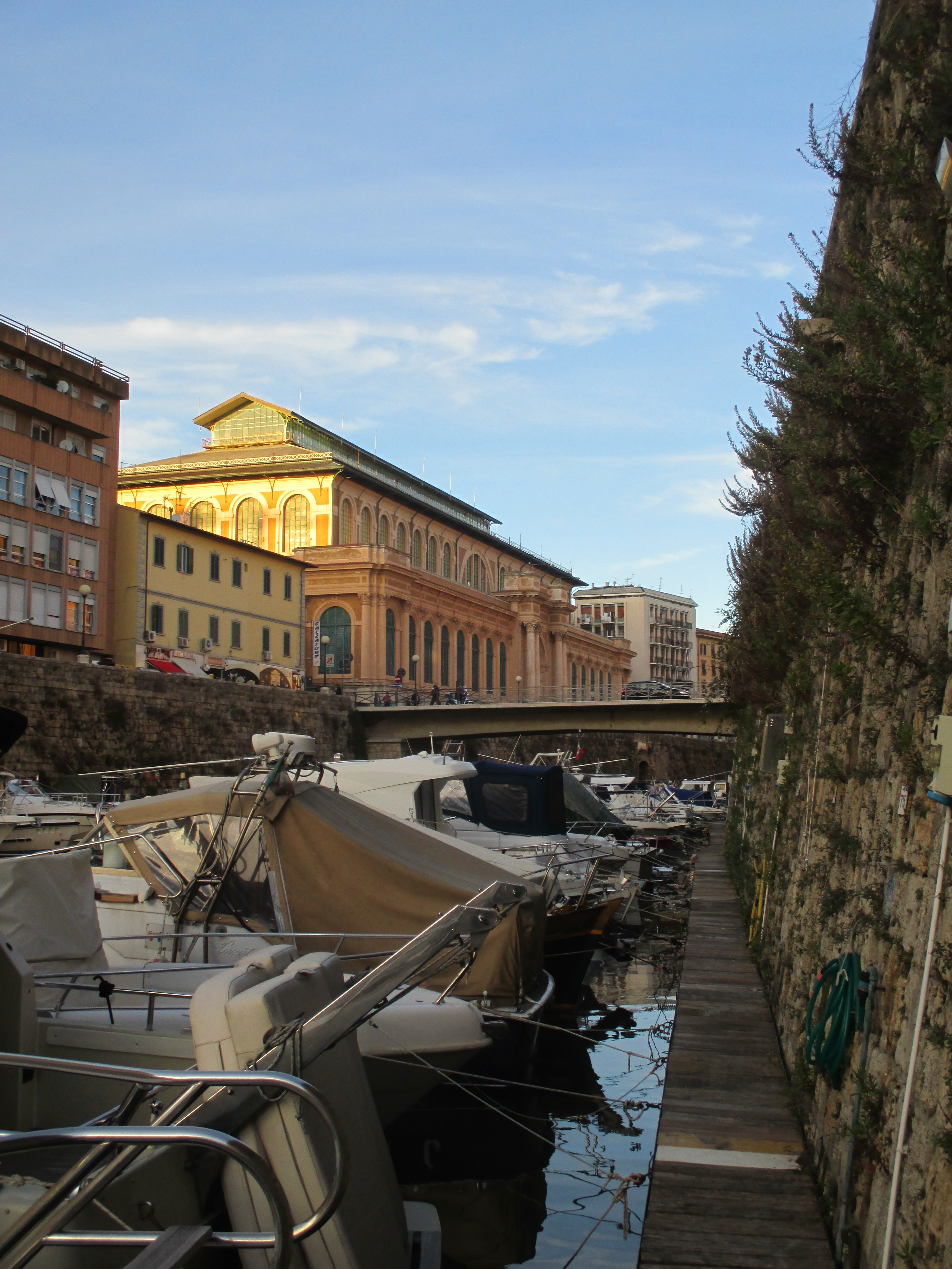 Livorno: veduta del Mercato delle Vettovaglie dal Fosso Reale, in prossimità degli Scali degli Olandesi